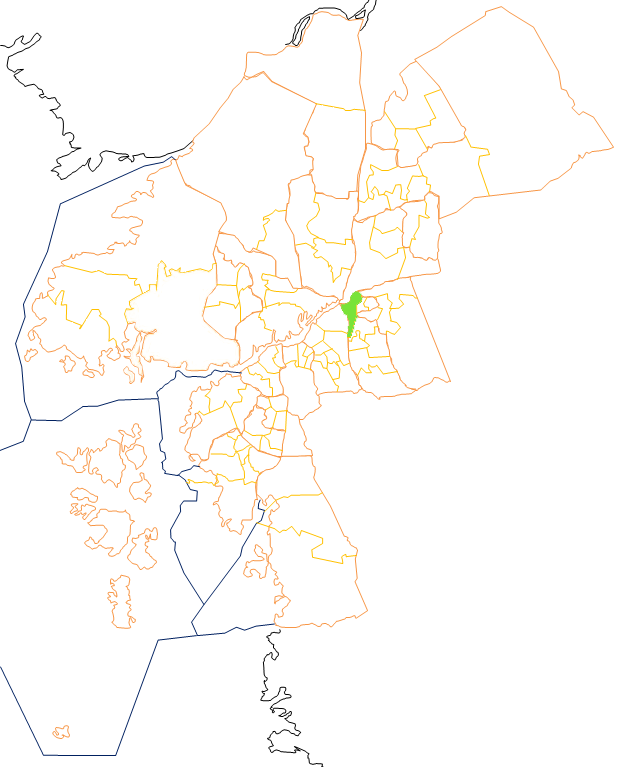 Karta som visar primärområdes belägenhet i Göteborg